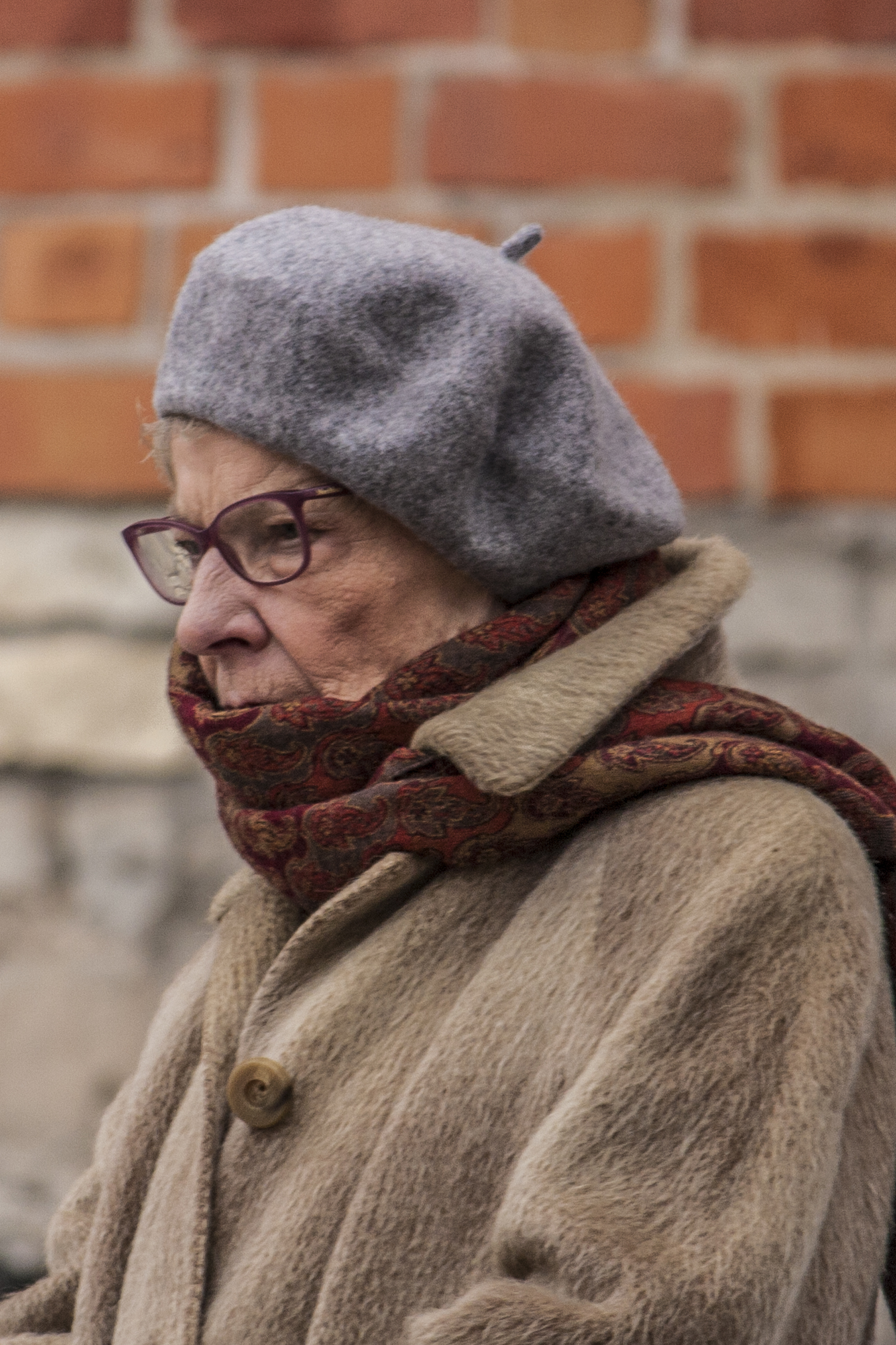 prof. Aleksandra Górska na planie serialu "Ojciec Mateusz" w Sandomierzu